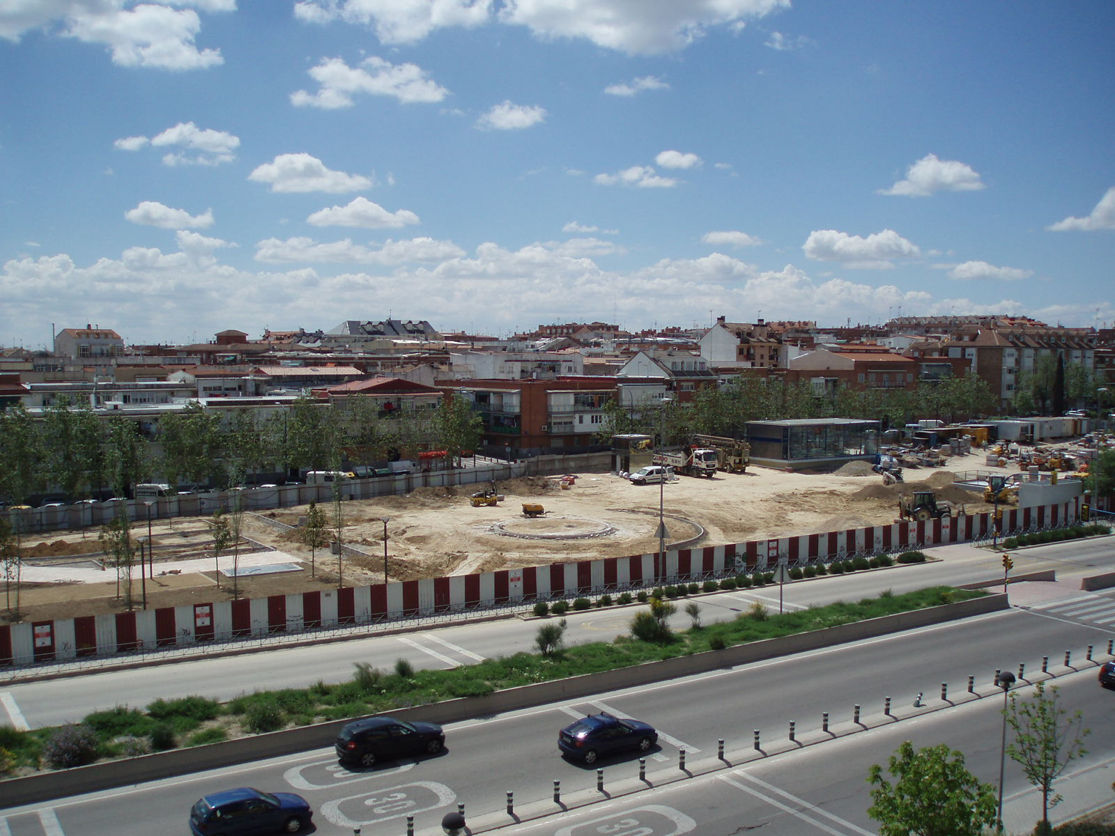 Fotografía tomada desde el CC Avenida M40.